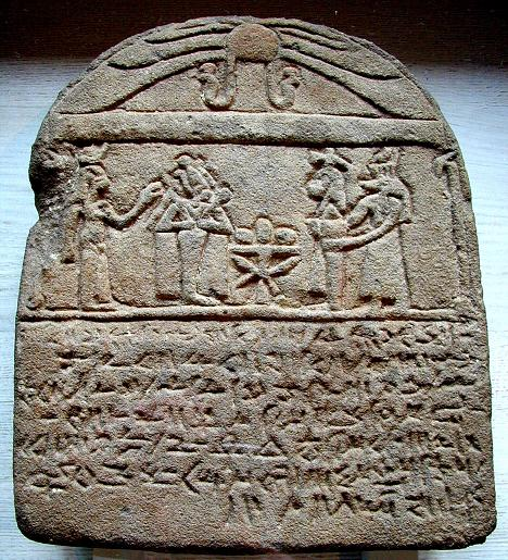 Stele in Demotisch. Neanderthalmuseum Mettmann. Eigene Aufnahme vom 18.07.2004.